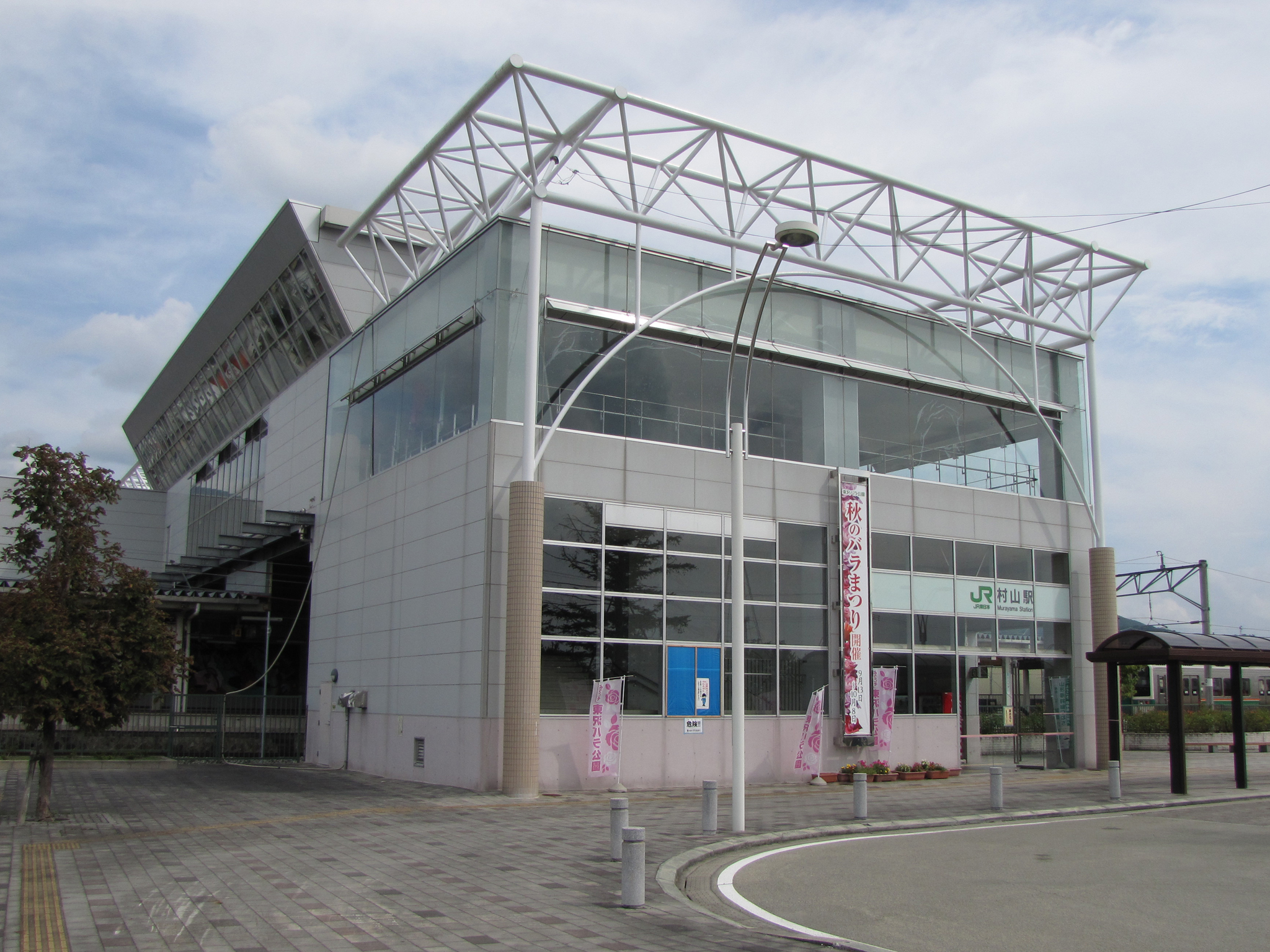 奥羽本線（山形線） 村山駅西口